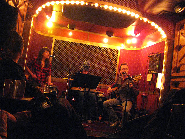 MeSoHungry foodblog post